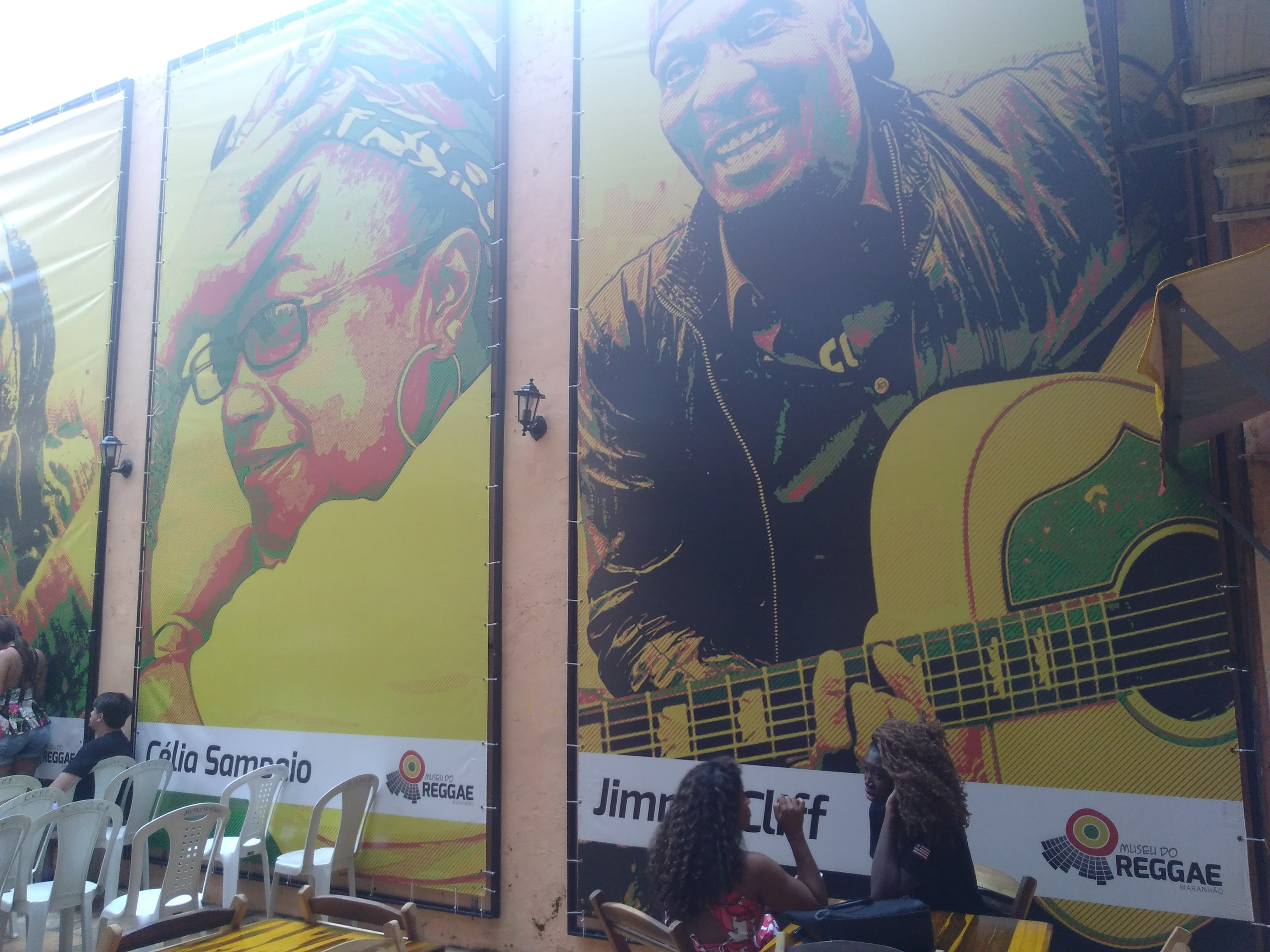 Área externa e acervo do Museu do Reggae do Maranhão, espaço de preservação musical único no país acerca deste gênero musical, o primeiro fora da Jamaica